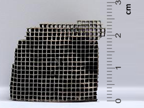 Auto-Katalysator. Skala in Zentimetern.